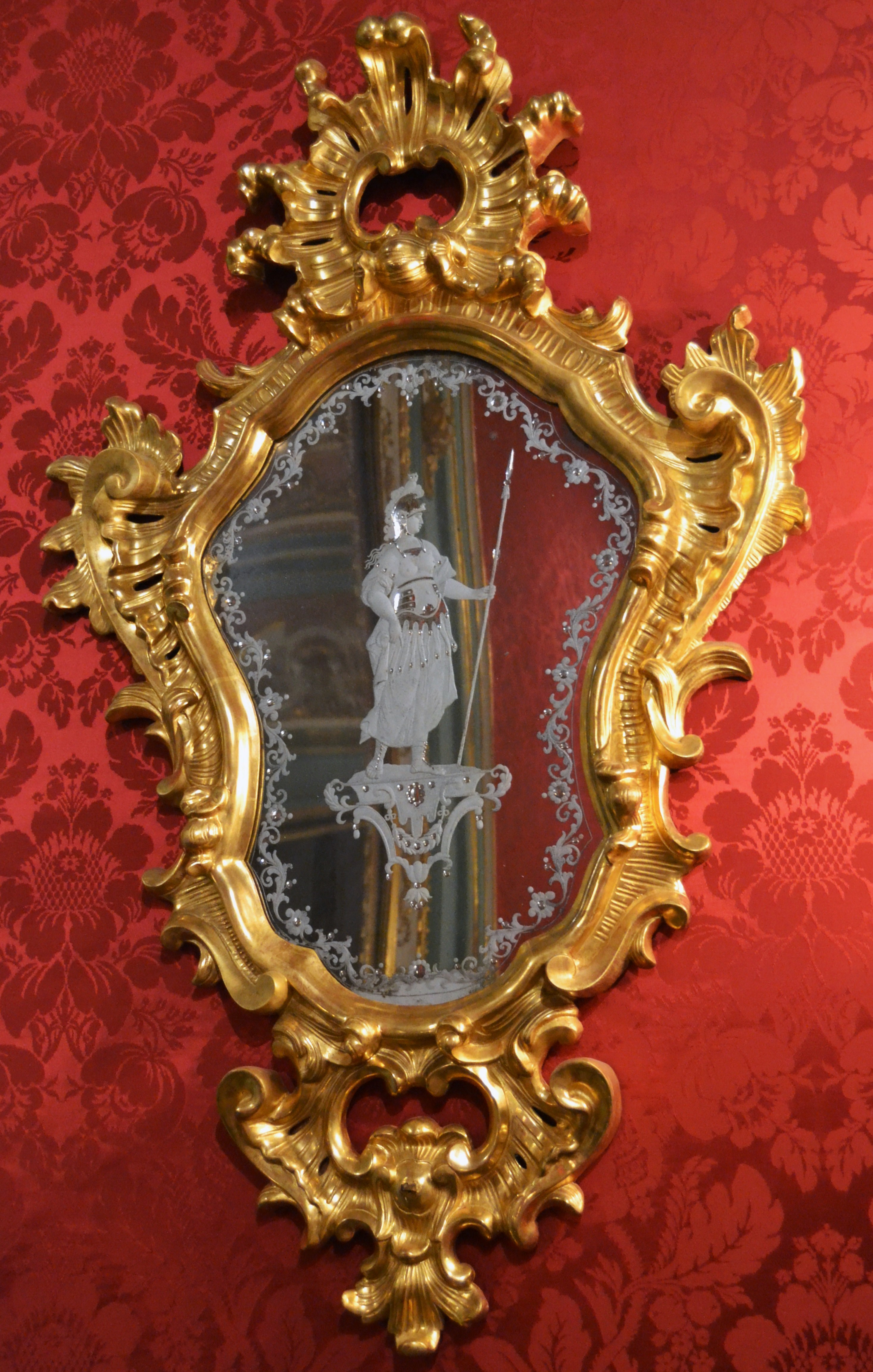 Cornucòpia de vidre, sala roja del palau del marqués de Dosaigües. La Granja de San Ildefonso, segle XVIII. CE3/01588 y 3/01589.